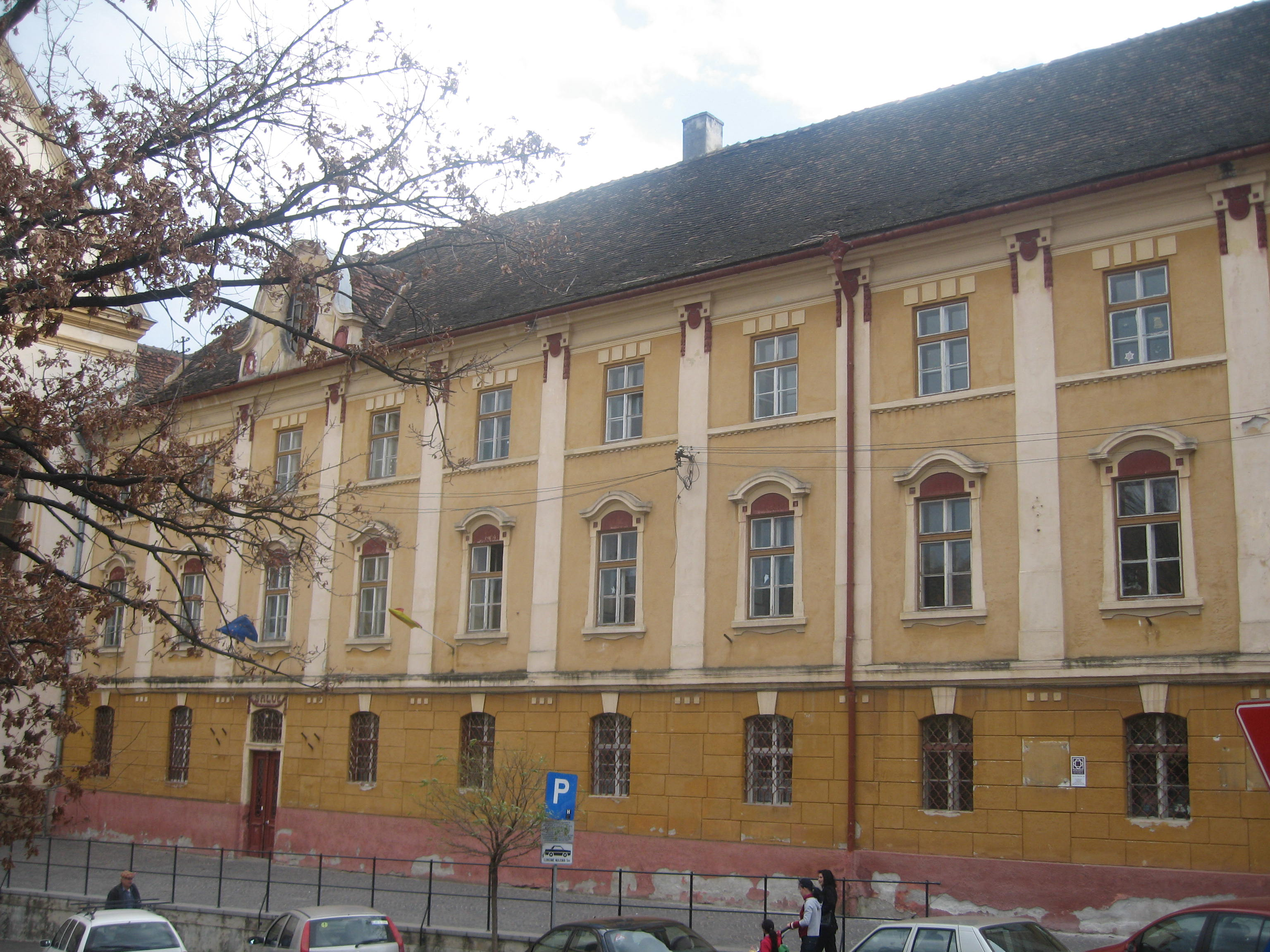 Liceul Pedagogic din Sibiu 02